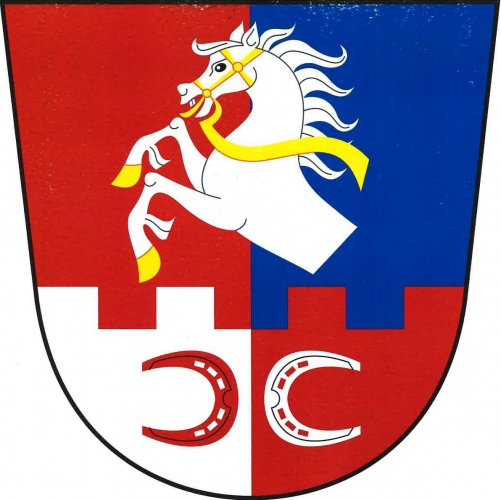 Staré Hrady, znak. V červeno-modře polceném štítě nad stříbrno-červeně polcenou hradbou s přivrácenými podkovami opačných barev polovina stříbrného koně se zlatými kopyty, jazykem a uzděním.